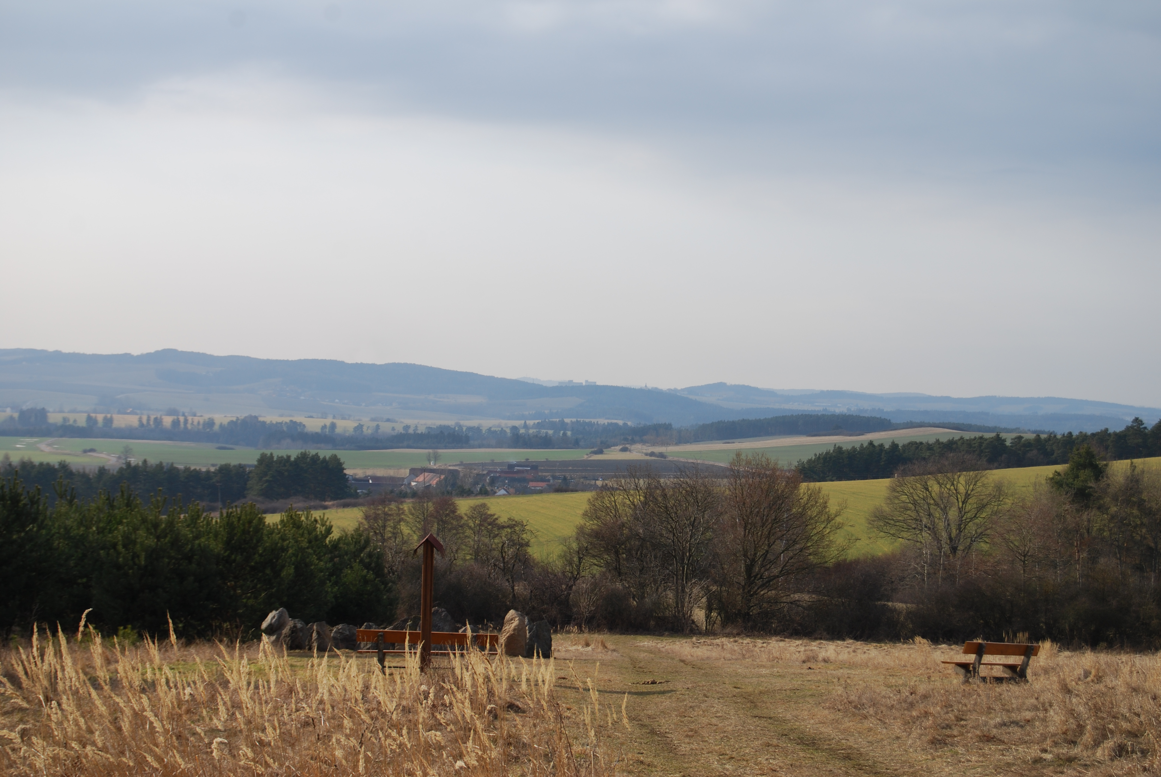 Pohled na okolí novodobých megalitických staveb. Nemějice je malá vesnice, část obce Slabčice v okrese Písek. Česká republika.